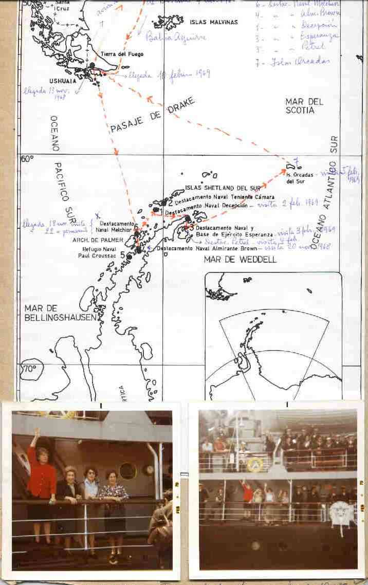 Irene Bernasconi. Viaje a Antartida 1968. Primeras investigadoras mujeres en Antartida. Mapa de la travesia. Antartida Argentina.